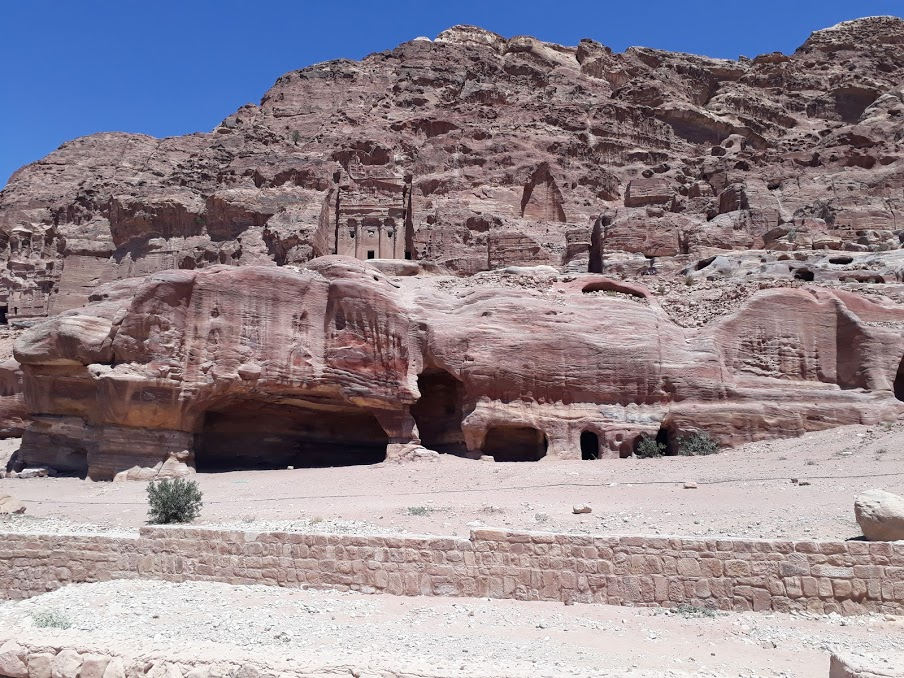 ഗ്യാലറിക്ക് മുന്നിൽ ആയി മലയിൽ കൊത്തിയെടുത്ത ഗുഹ സമുച്ഛയങ്ങൾ